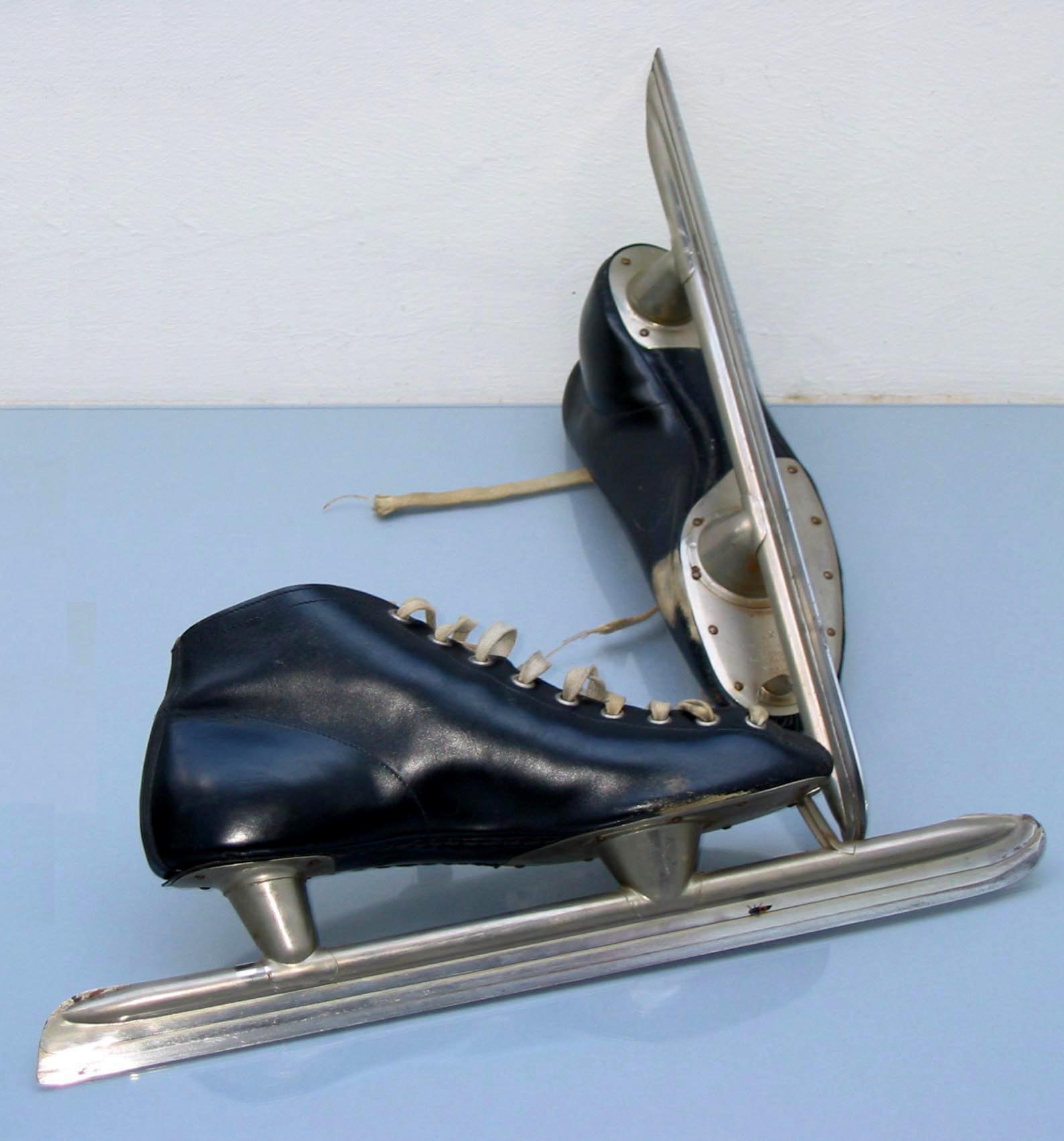 Schnelllauf-Schlittschuhe